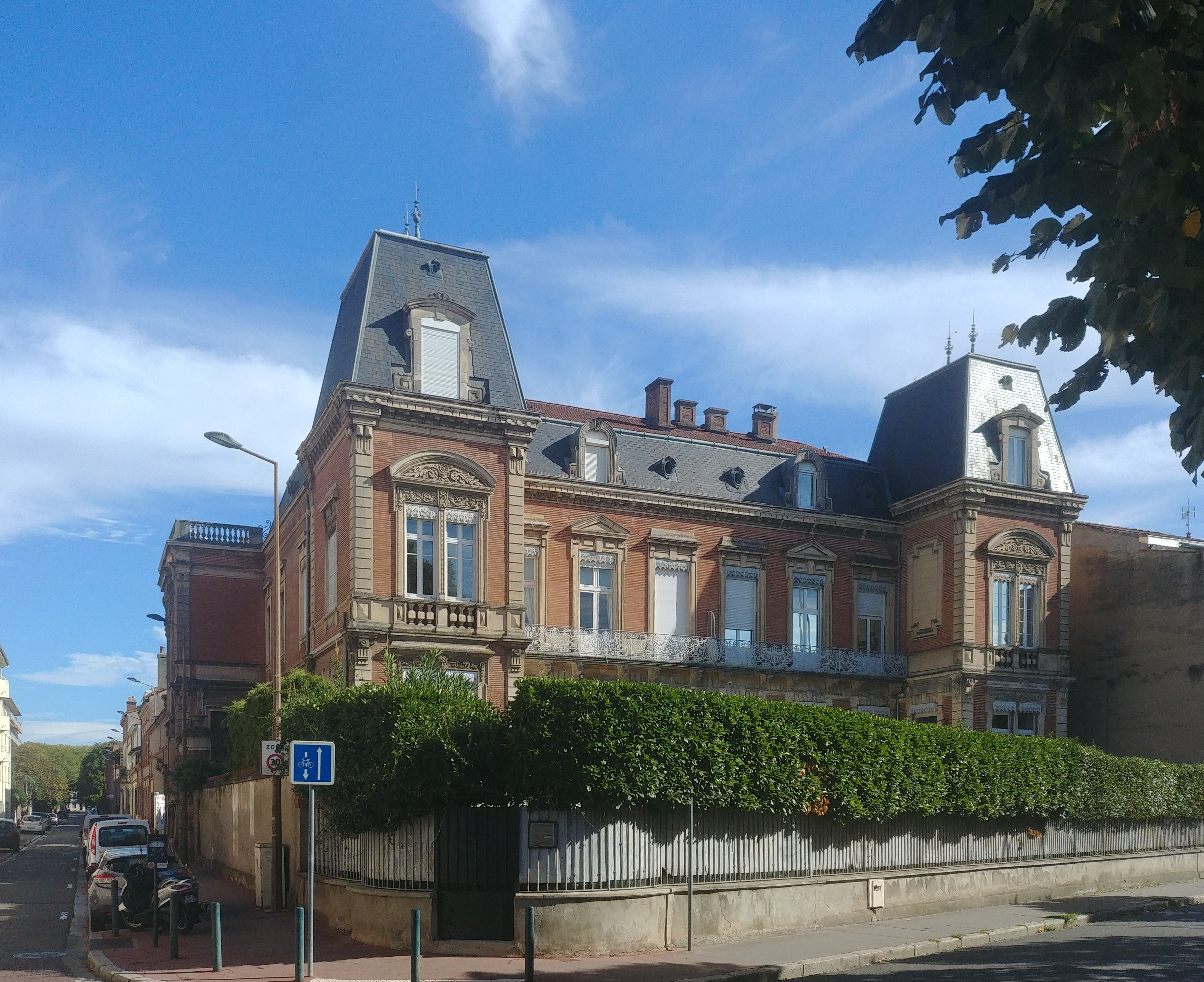 Ancien siège de la Gestapo à Toulouse, 2, rue des Martyrs de la Libération ( sur l'angle formé avec les Allées Frédéric Mistral)